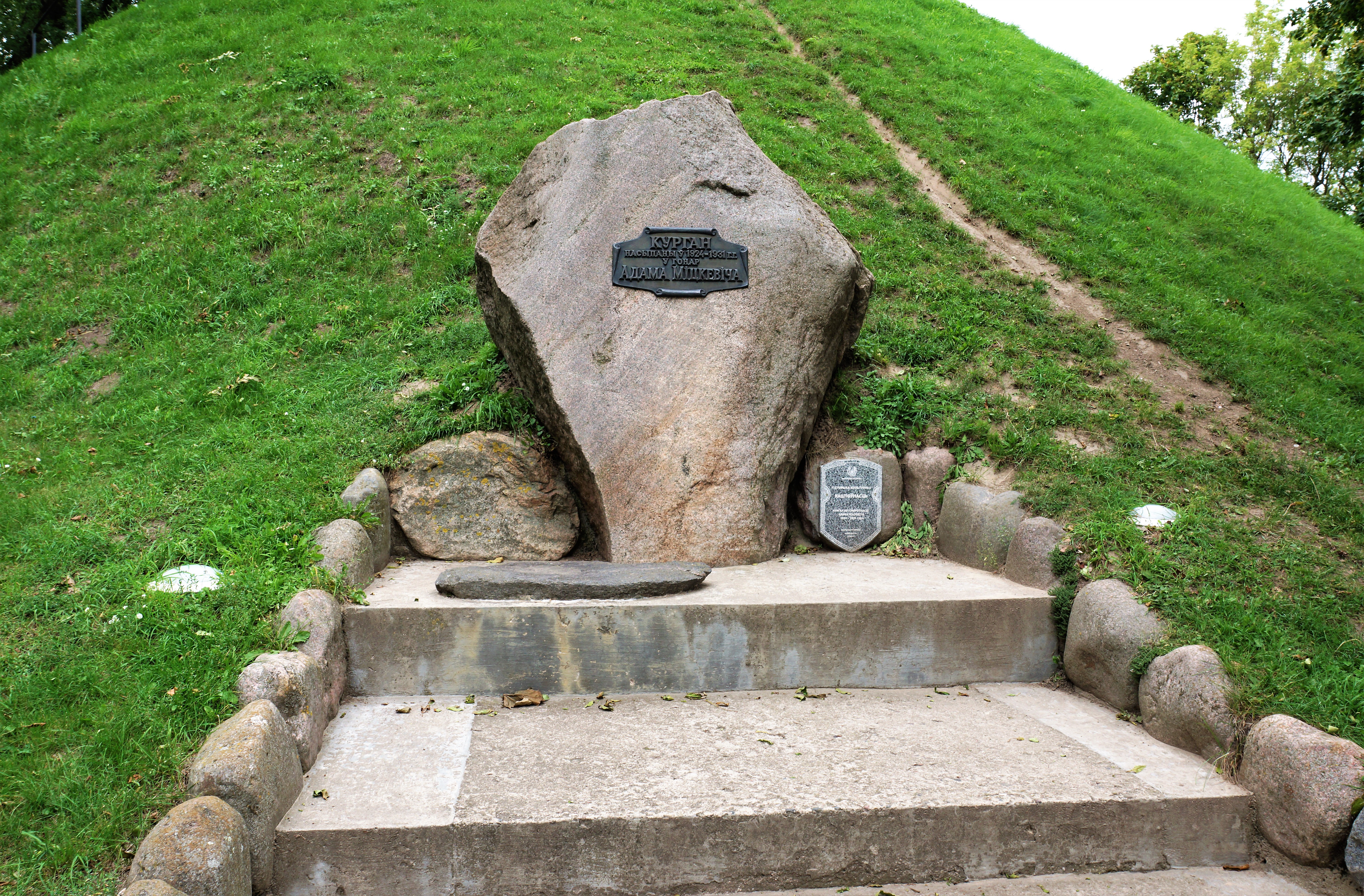 Беларуская (тарашкевіца): Курган Бессьмяротнасьці Адама Міцкевіча. г. Наваградак This is a photo of Belarusian heritage monument. Reference number: 411Д000405 ( WLM)